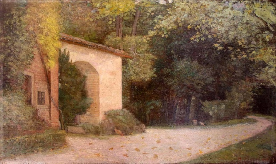 Villa nel parco, olio su tavola, 21.5 x 37 cm., firmato e datato, coll. privata